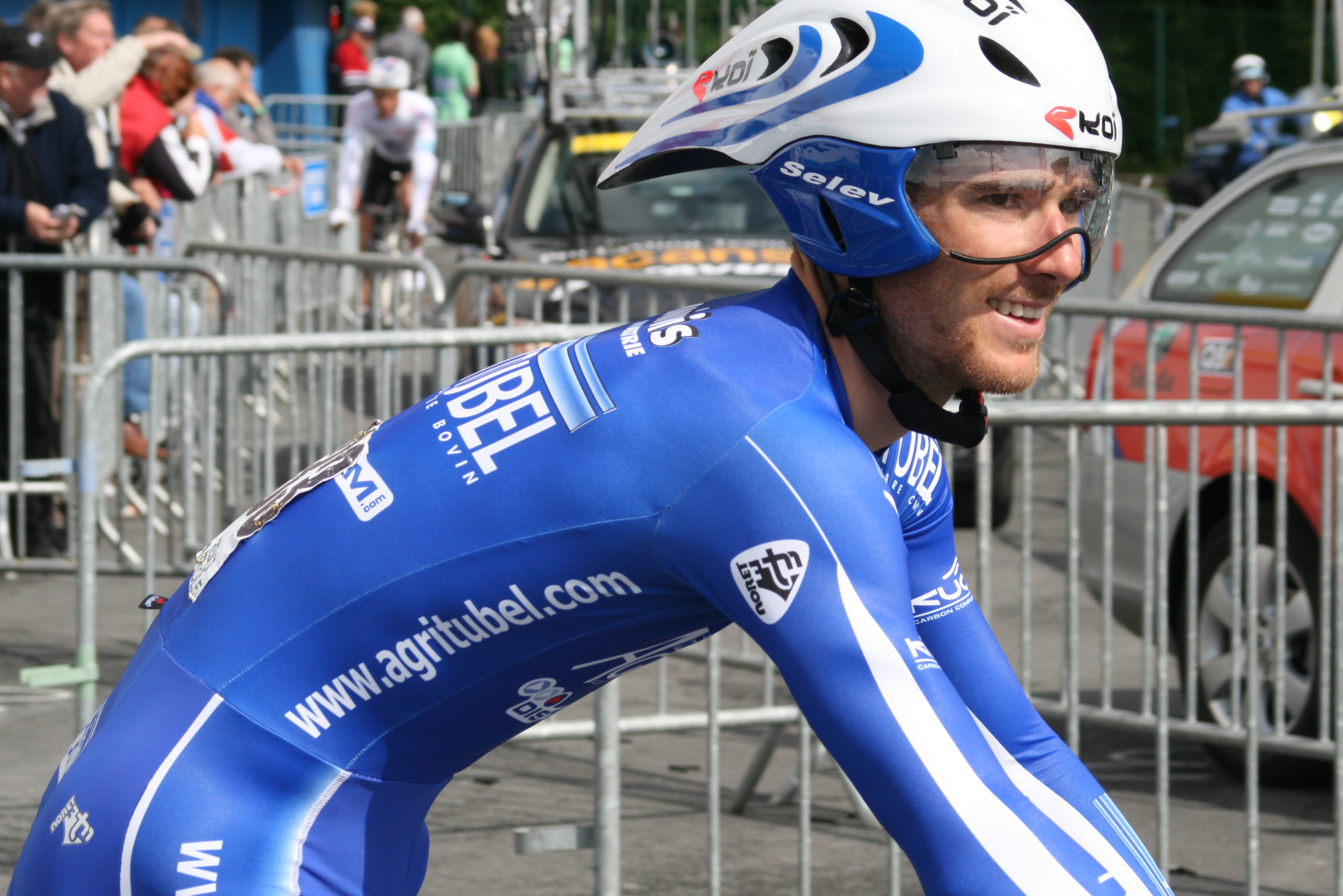 Romain Feillu lors des Quatre jours de Dunkerque 2009